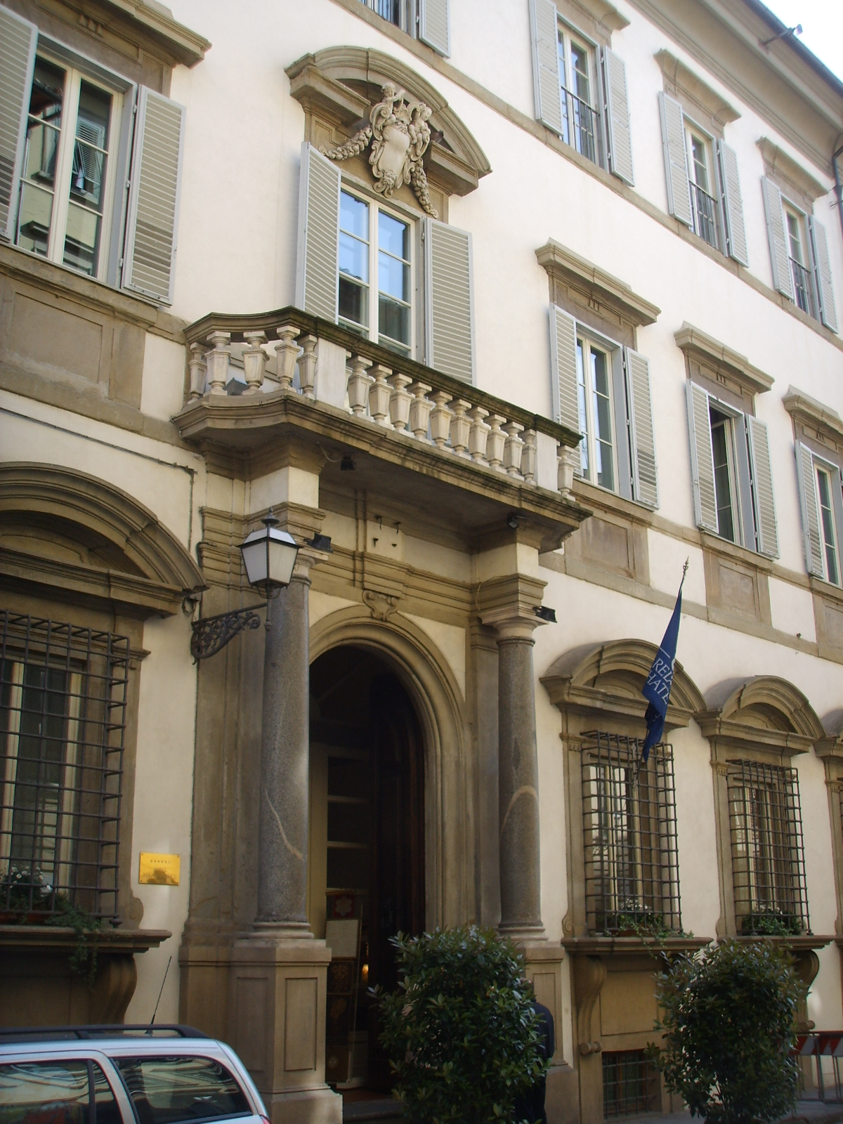 Palazzo jacometti-ciofi ingresso